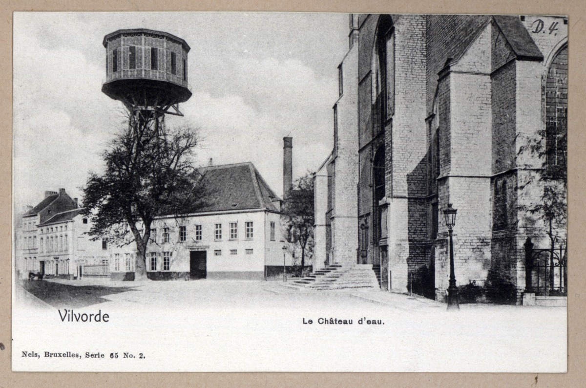 Oude watertoren (afgebroken) Vilvoorde, Lange molenstraat